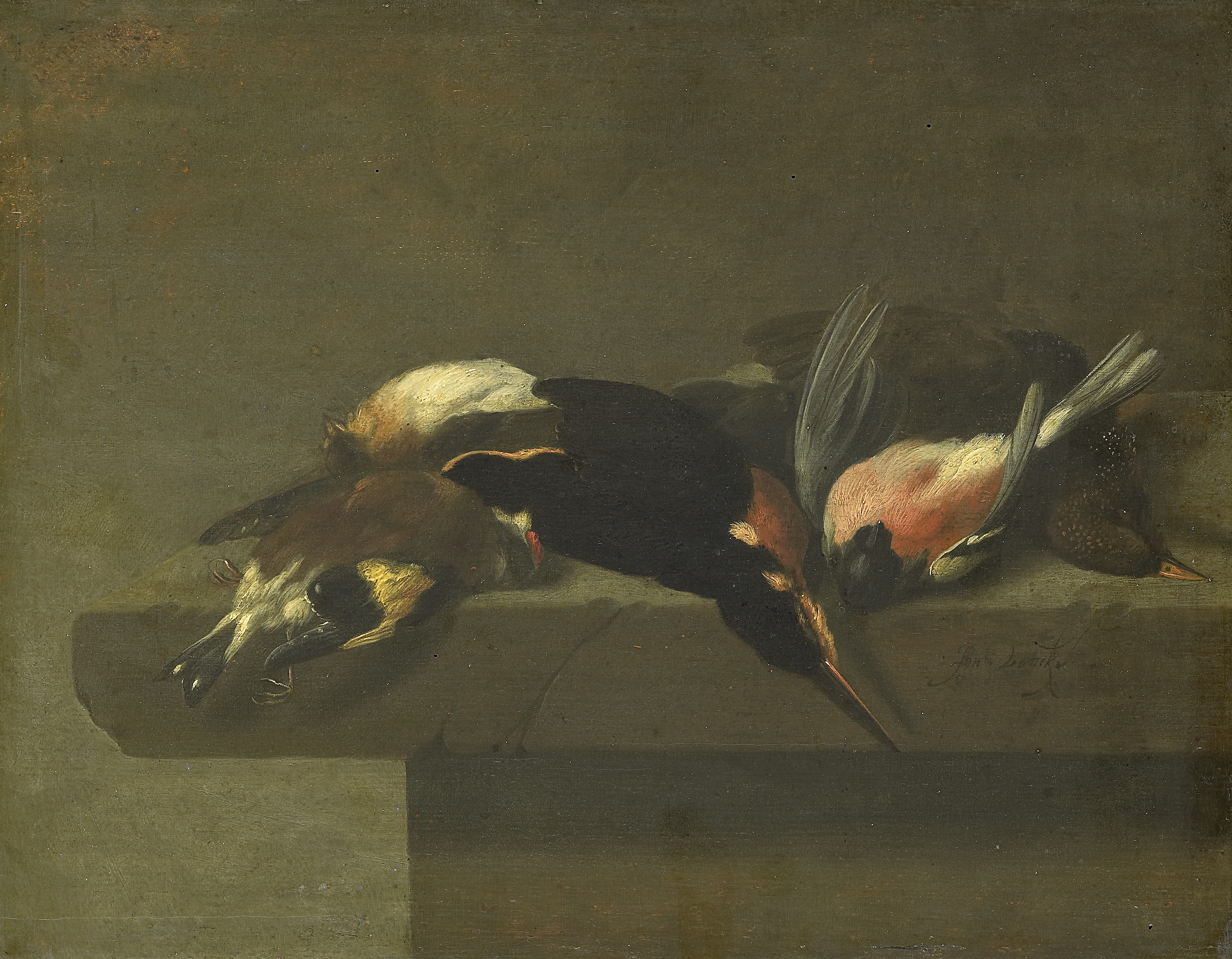 Stilleven van een groepje dode vogels liggend op een stenen plint.